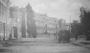 Улица Александровская, Царицын, Российская империя